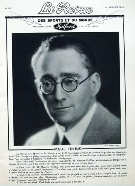 Page 1 de la Revue des sports et du monde Matford numéro 29 de janvier 1936 consacrée à la mort de Paul Iribe (1883-1935).